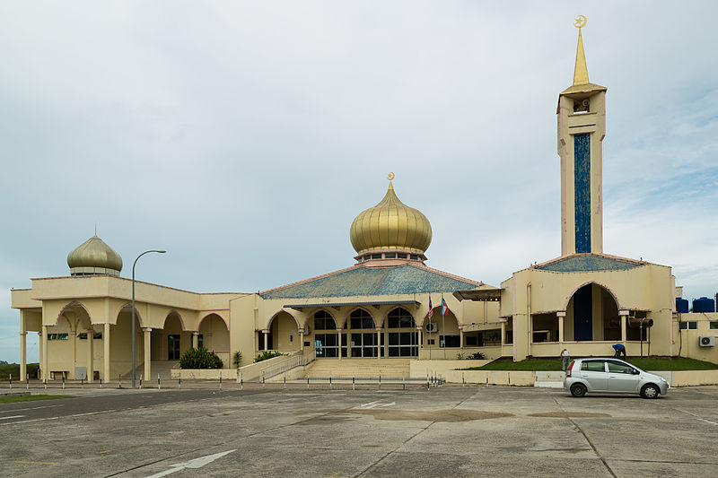 Masjid Daerah Hj Hashim, Sipitang